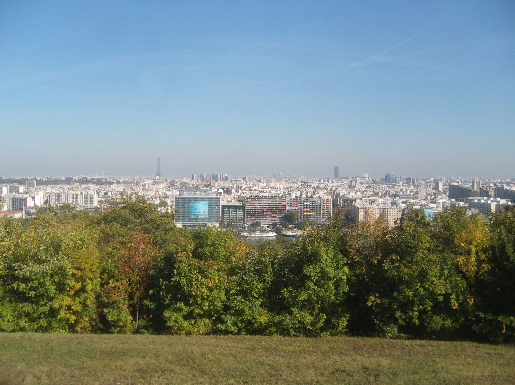 Parc de Saint-Cloud - vue sur Boulogne-Billancourt et Paris depuis le rond-point de la Balustrade, en direction de l'est